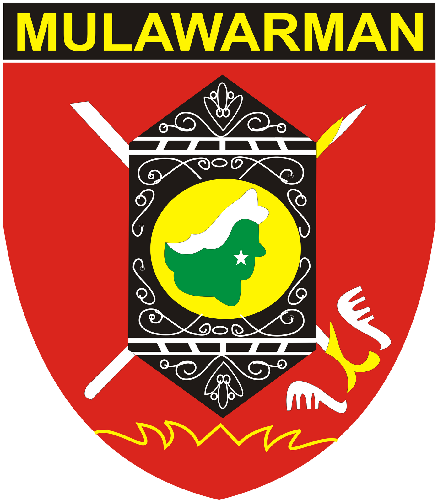 Gambar ini adalah Lambang Kodam VI/Mulawarman